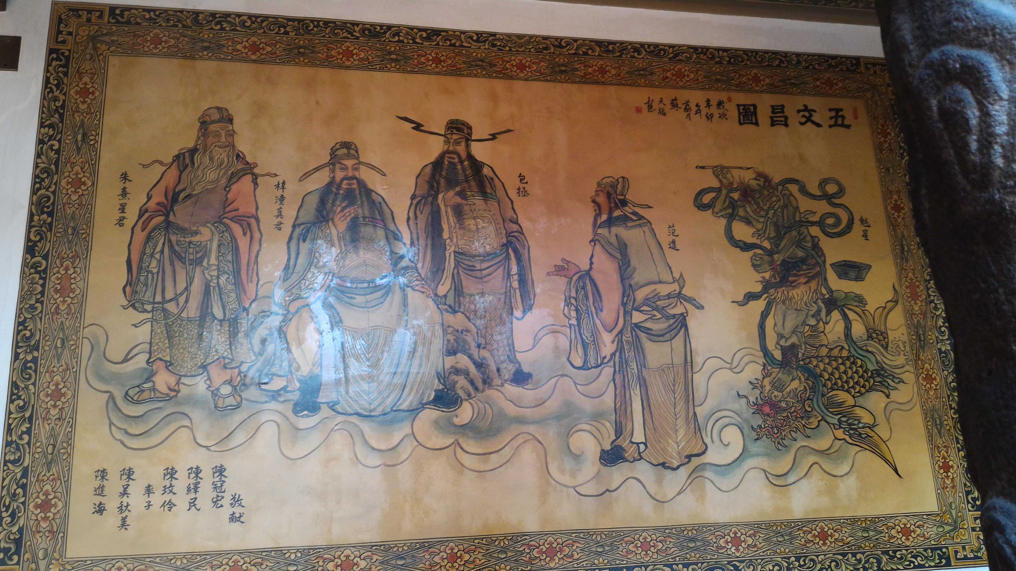 臺南海安宮壁畫「五文昌圖」，由左至右為朱熹星君、梓潼真君、包拯、范進、魁星，但范進不在道教五文昌之列。